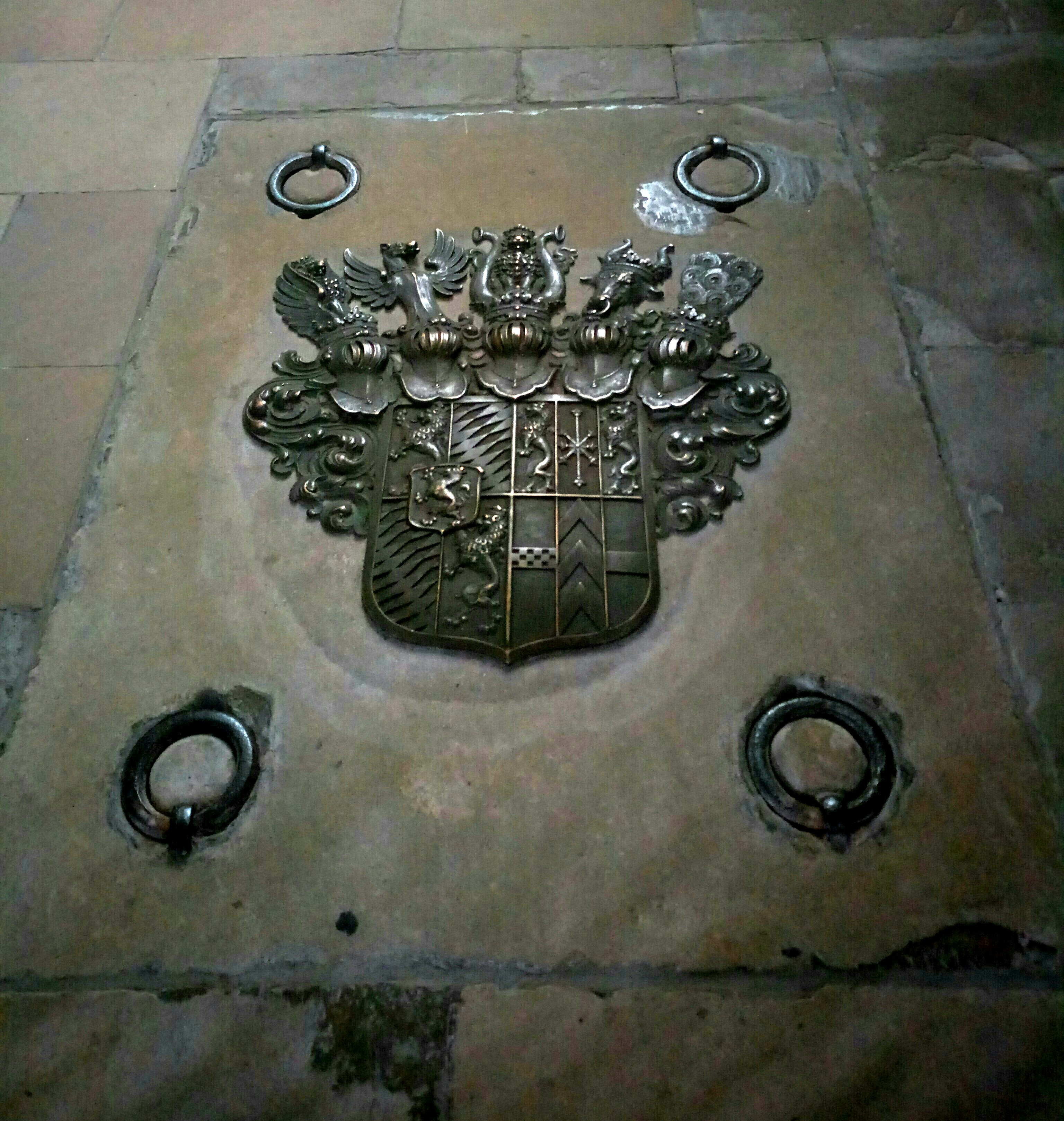 Wittelsbachergruft, Schlosskirche Meisenheim